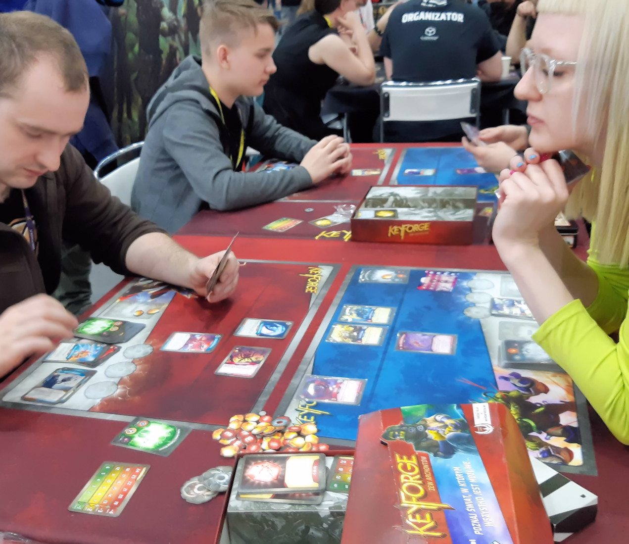 Rozgrywka w grę karcianą KeyForge na jednym ze stoisk na Festiwalu Fantastyki Pyrkon 2019 w Poznaniu, Polska